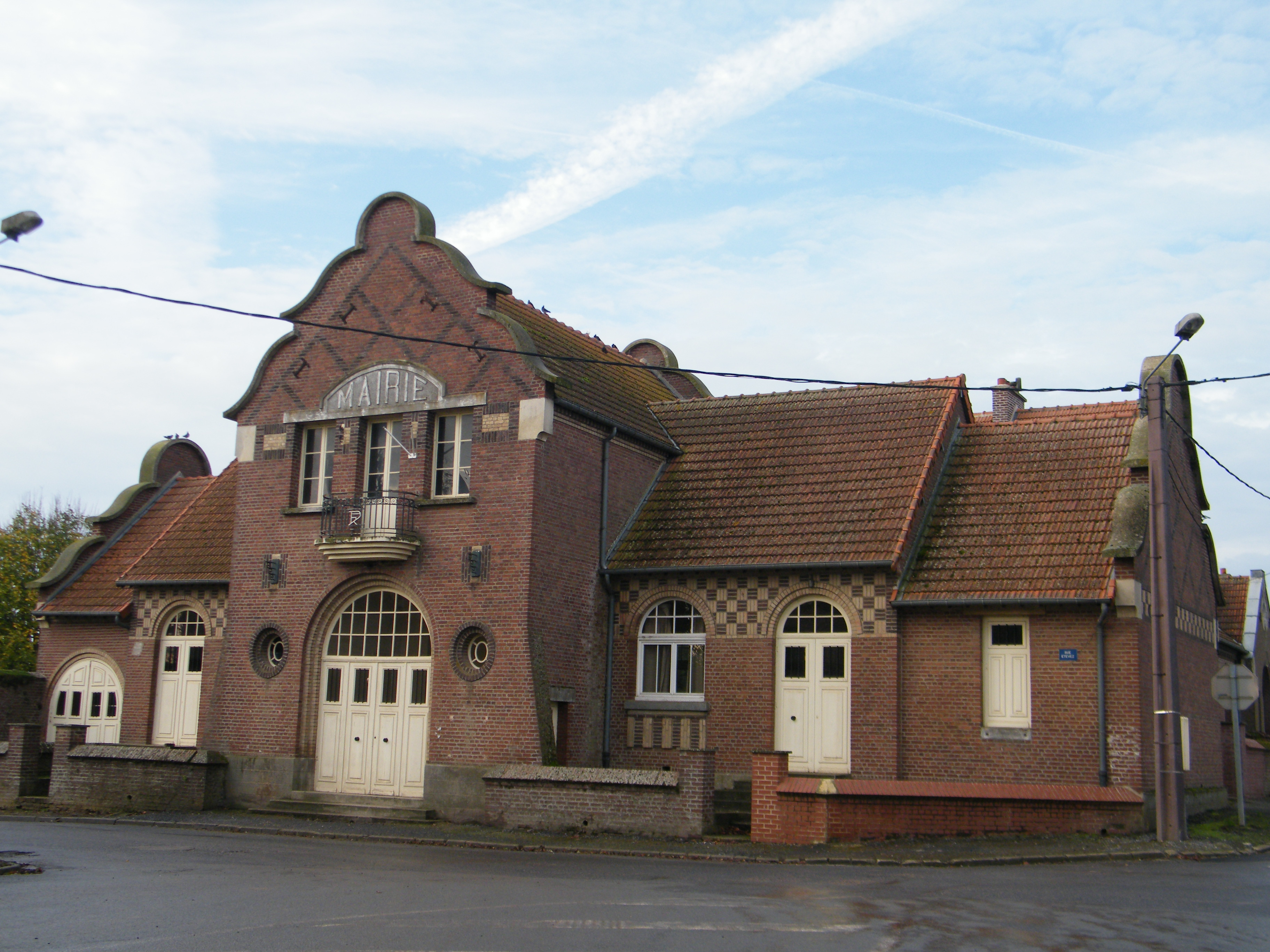 Mairie-école.